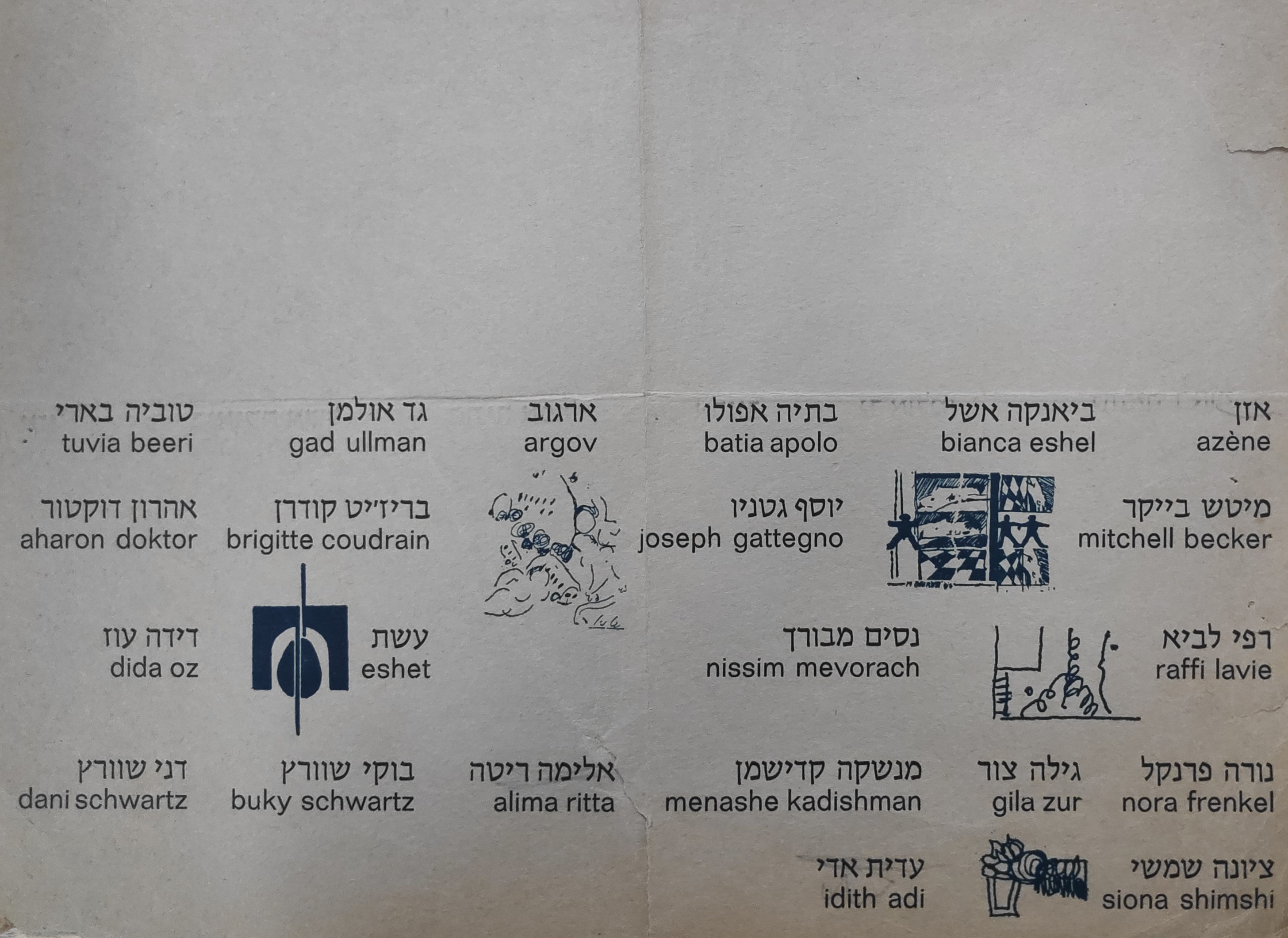 מתוך האוסף של בנו כלב